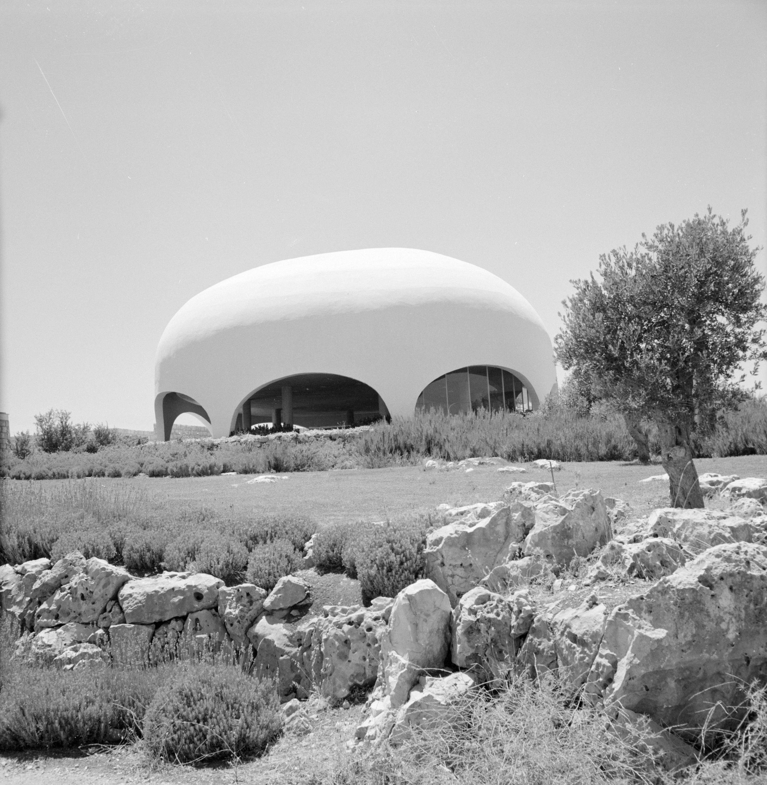 Collectie / Archief : Fotocollectie Van de Poll Reportage / Serie : Israël 1964-1965: Jerusalem (Jeruzalem), Hebrew University Beschrijving : Jeruzalem.Synagoge op de campus van de "Hebrew University" Annotatie : Op 1 april 1925, werd de Hebreeuwse Universiteit van Jeruzalem geopend tijdens een feestelijke ceremonie die werd bijgewoond door de leiders van de wereld. Het eerste bestuur van de Universiteit bestond onder andere uit grootheden als Albert Einstein, Sigmund Freud, Martin Buber, James Rothschild en Sir Alfred Mond Datum : 1964 Locatie : Israël, Jeruzalem Trefwoorden : gebouwen, joodse religie, panorama's, synagogen, universiteiten Fotograaf : Poll, Willem van de, [onbekend] Auteursrechthebbende : Nationaal Archief Materiaalsoort : Negatief (zwart/wit) Nummer archiefinventaris : bekijk toegang 2.24.14.02 Bestanddeelnummer : 255-2430